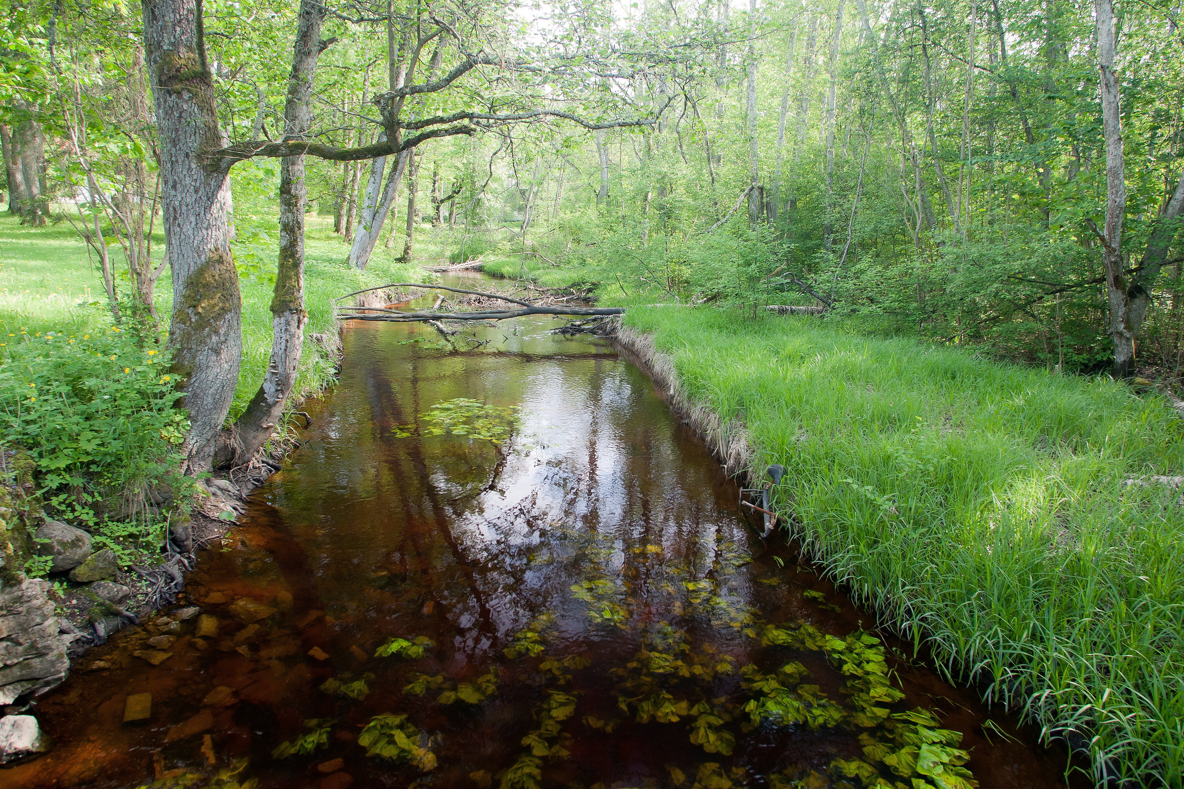 Harmi mõisa park